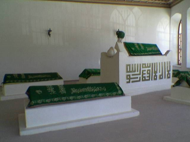 Date: 08.08.2008-14:11